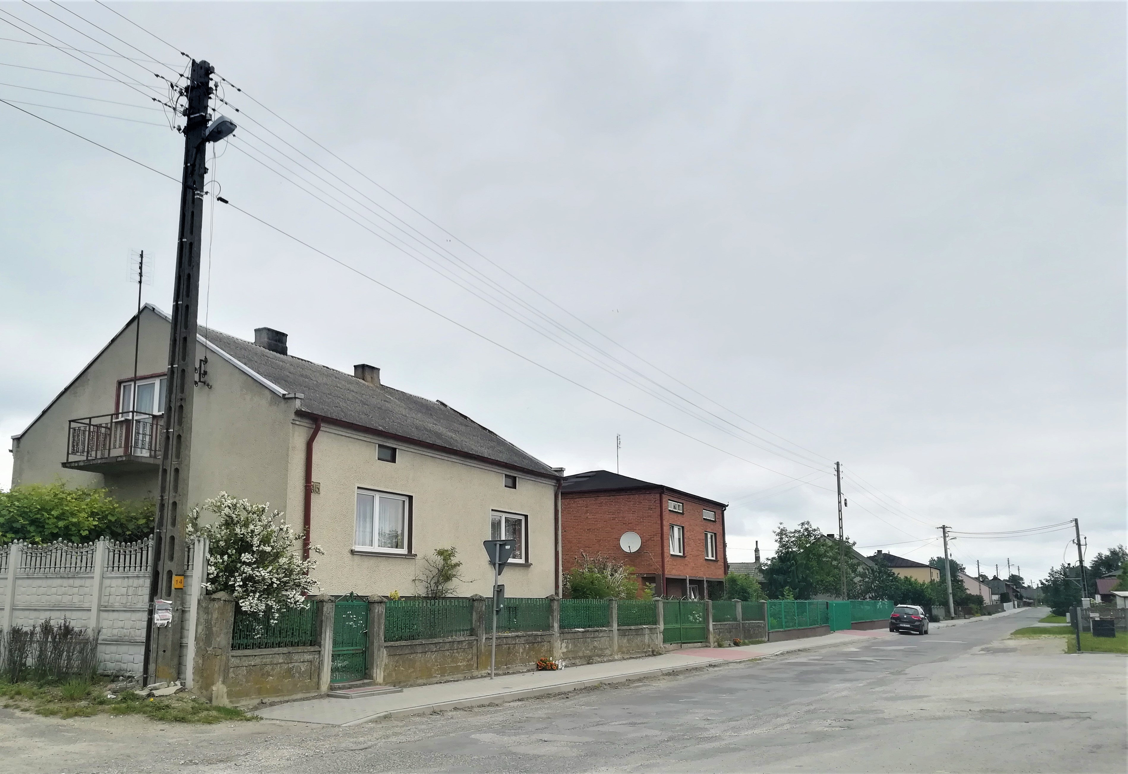 Przerąb.